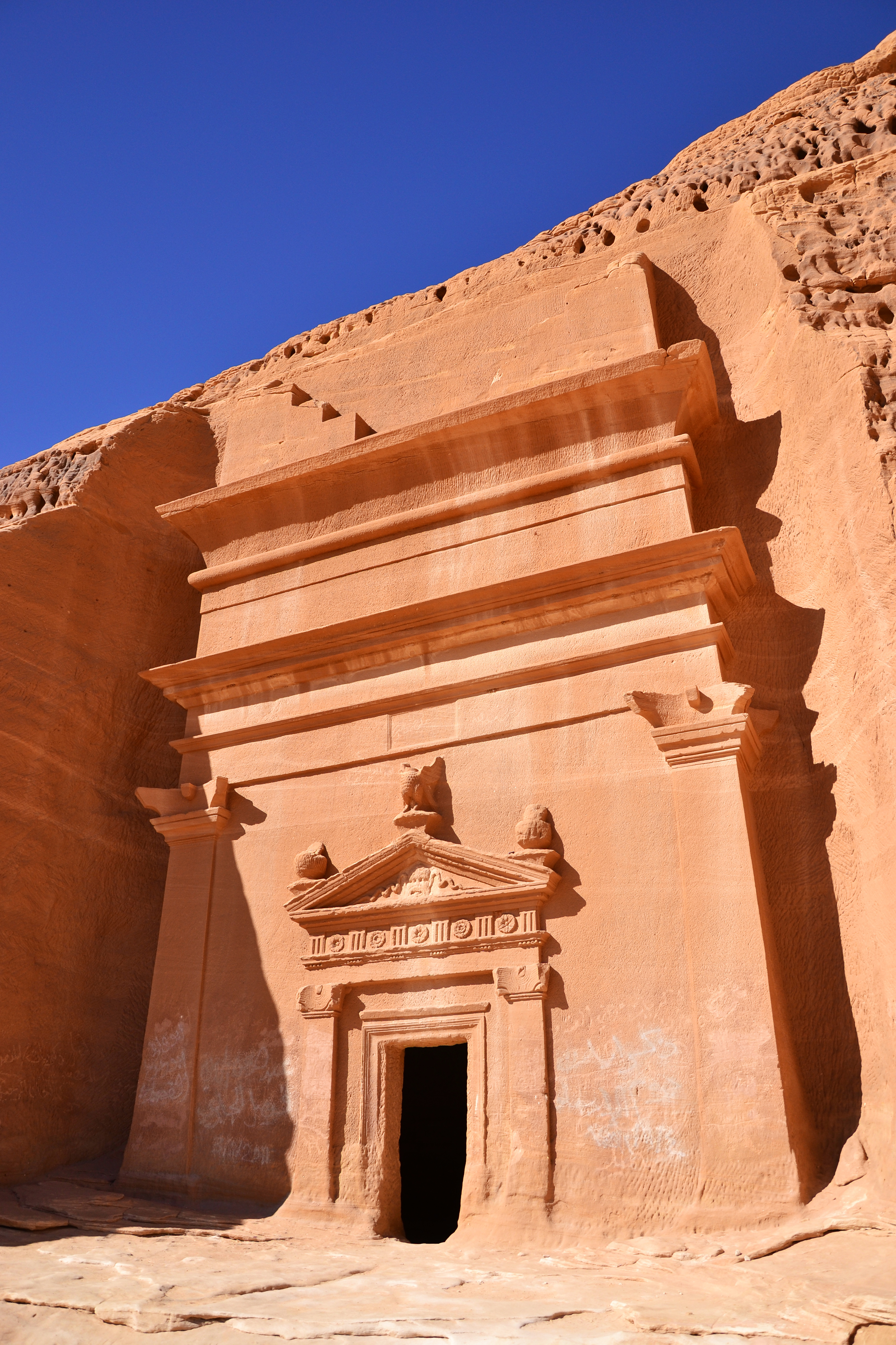 Madain Saleh